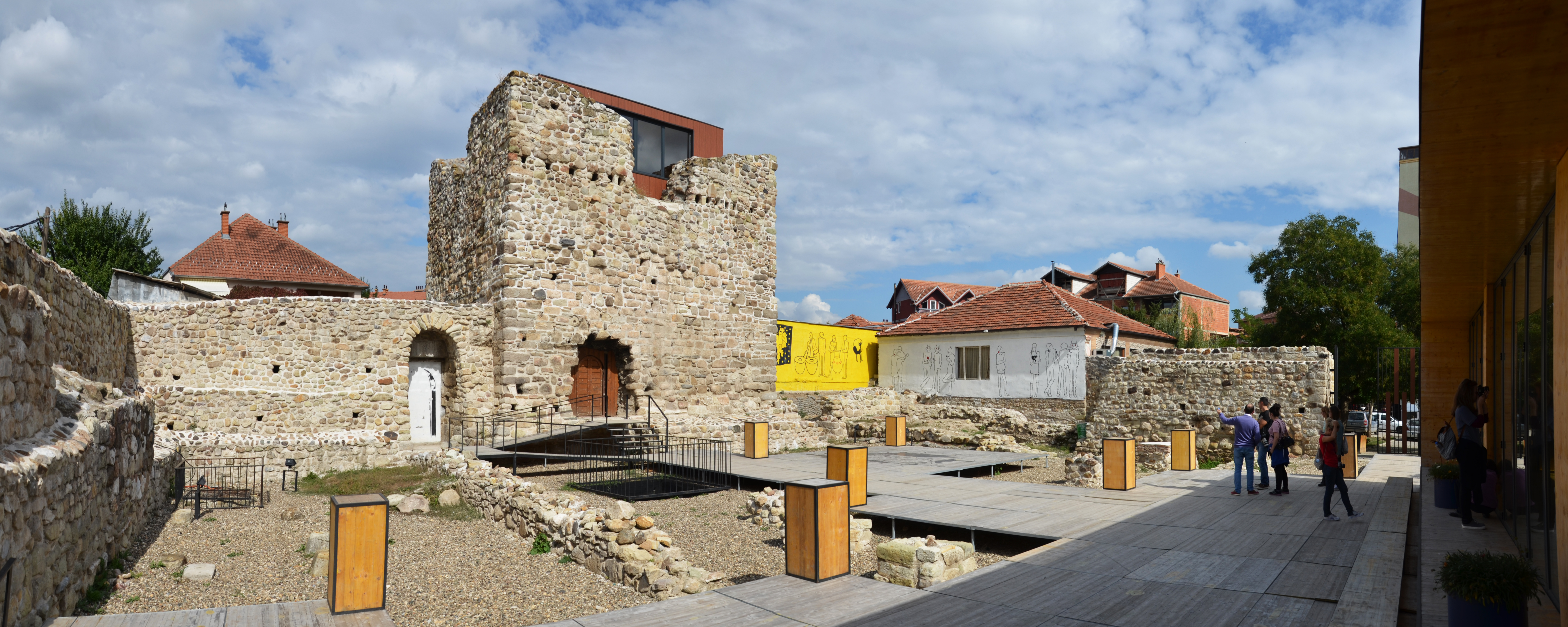 Kështjella “Kalaja” Kulla e Vjetër - Ambienturë Panorama